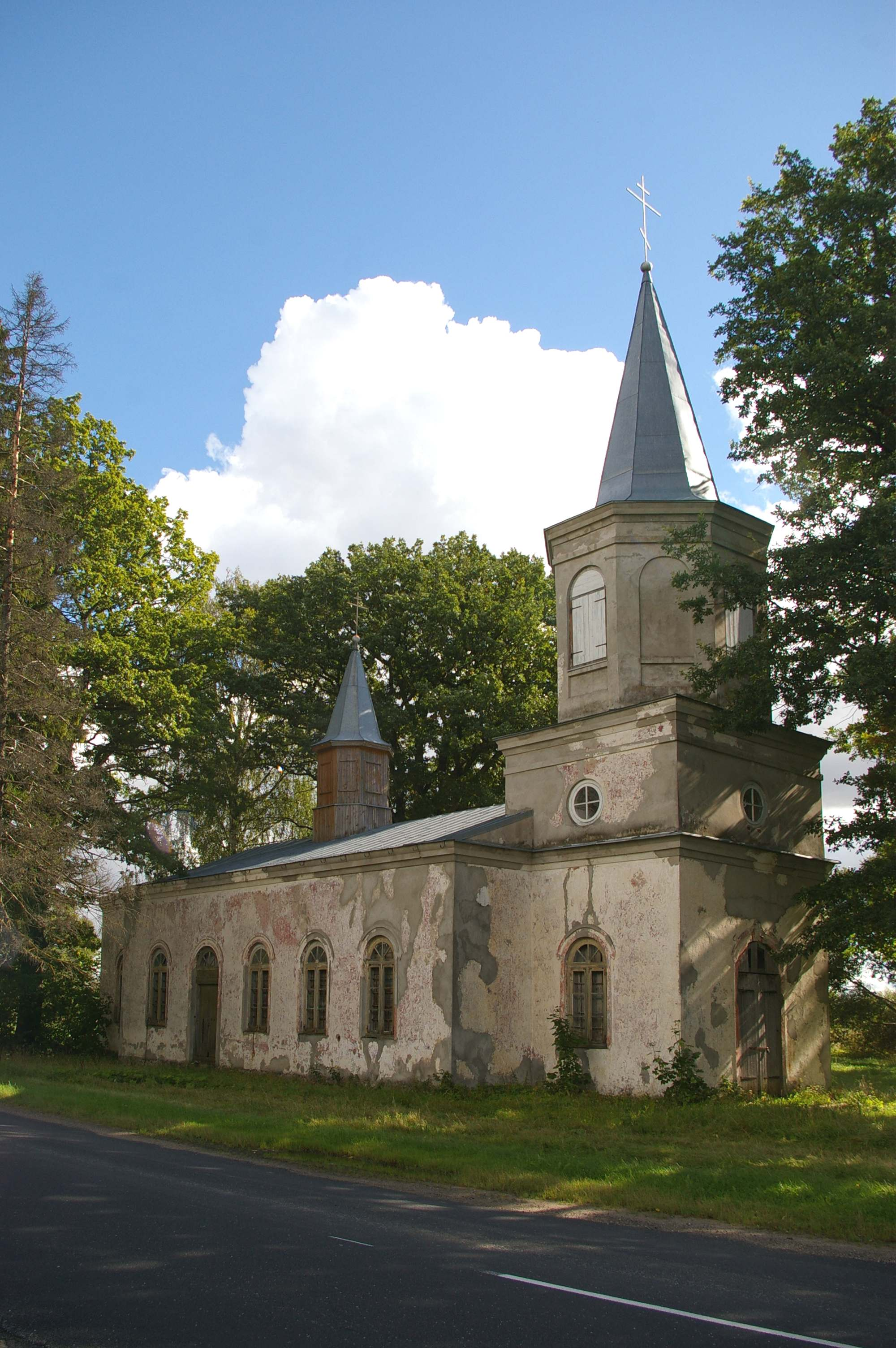 Kristuse Sündimise kirik. Asukoht: Pärnumaa, Randivälja küla.